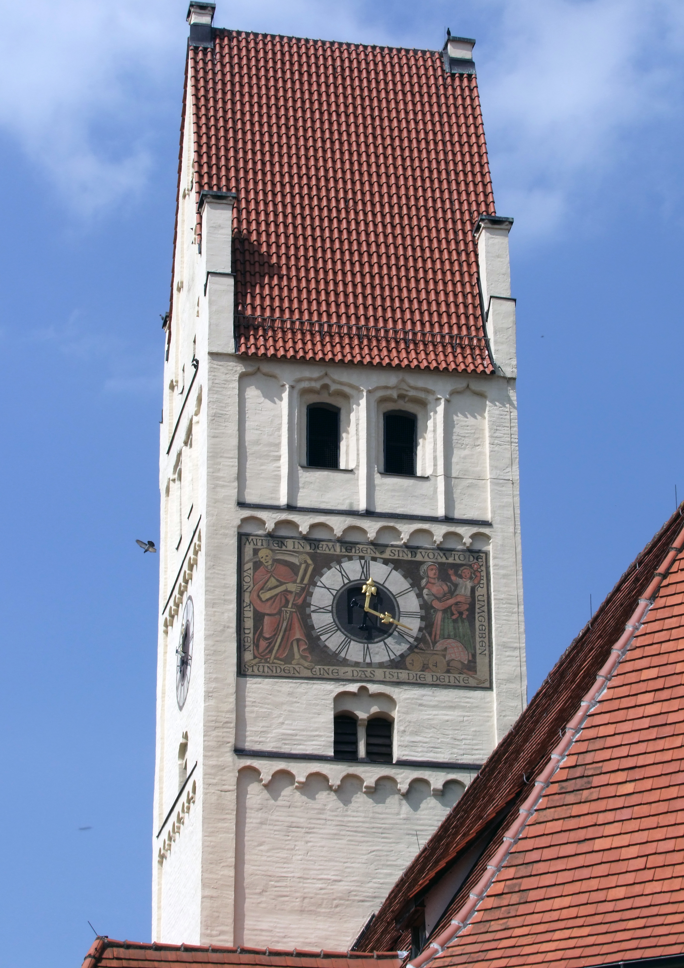 Kirchturm der Marienkirche in Vöhringen